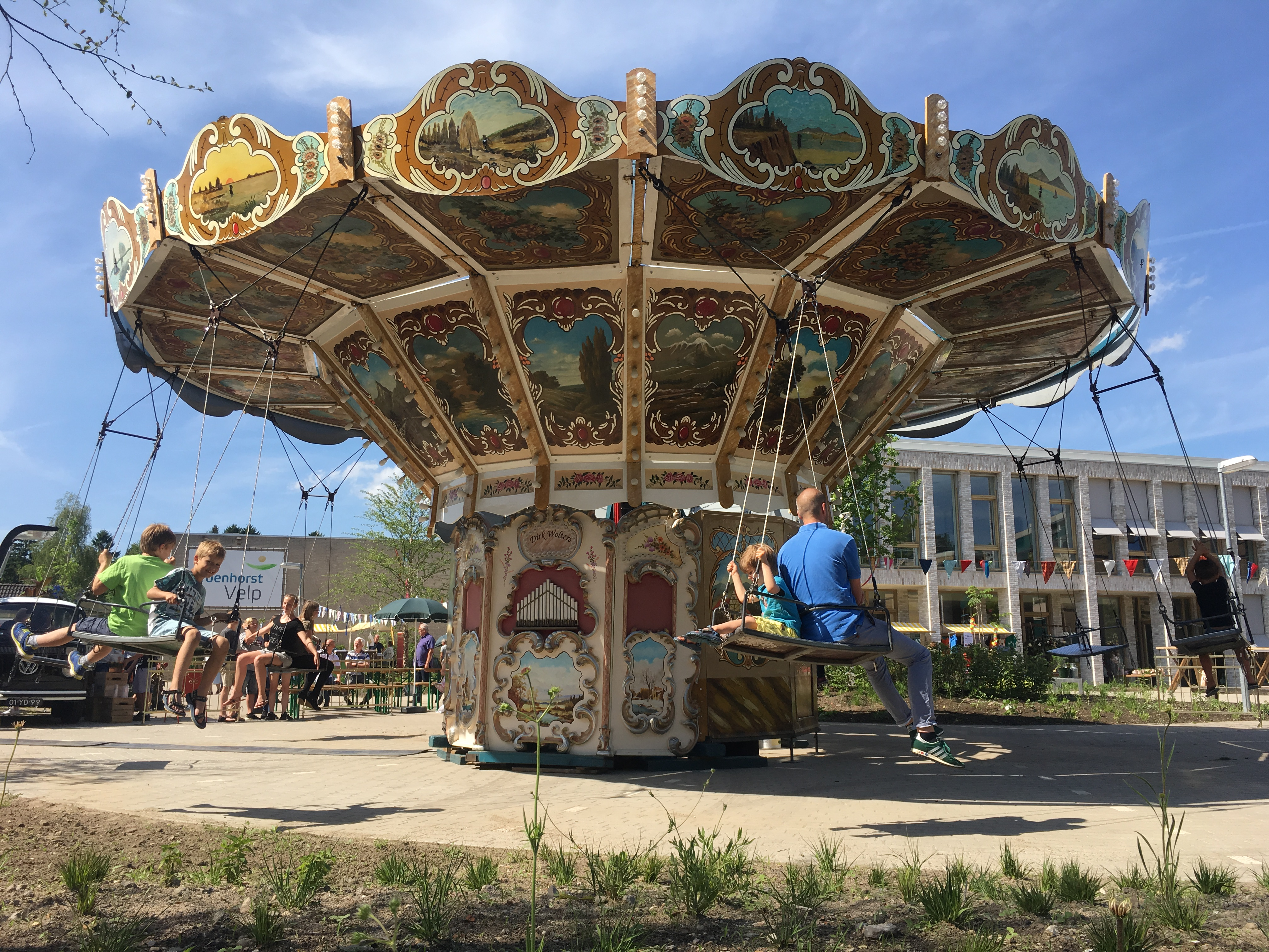 Zweefmolen (Wolters)